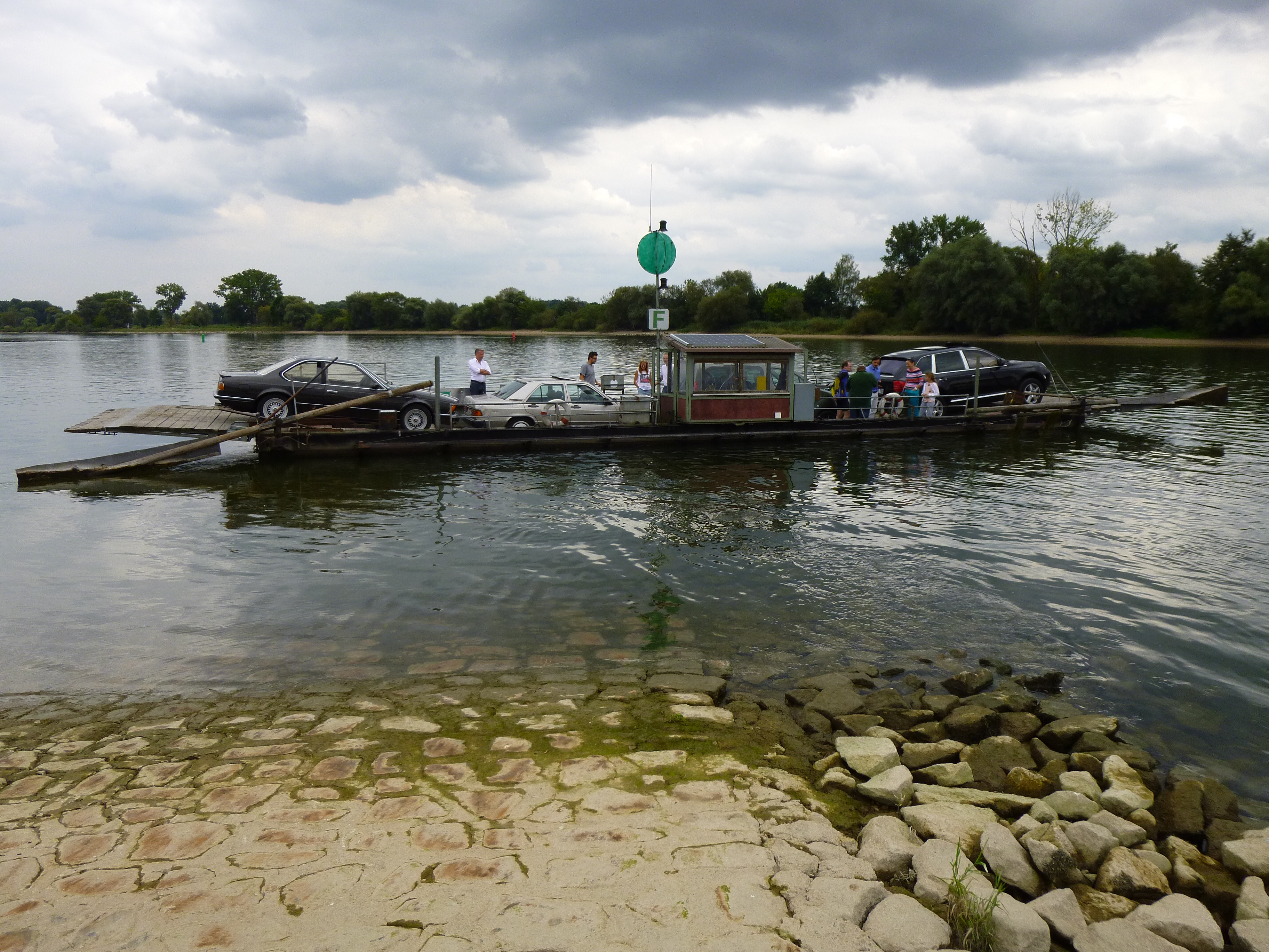 Die Donaufähre in Mariaposching beim Übersetzen nach Stephansposching. Es werden Fahrzeuge und Menschen transportiert. Es haben max. 4 Autos auf der Fähre Platz. Beliebt ist die Fähre insbesondere bei Radfahrern.